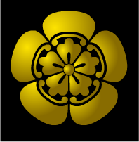 織田家家紋、五つ瓜に唐花